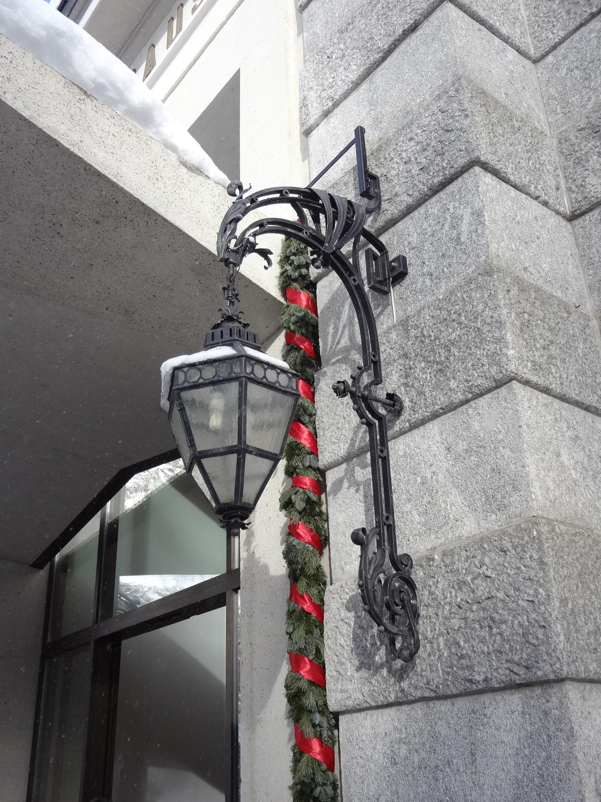 Lanterne à côté de l'entrée de l'Hôtel Waldhaus de Sils-Maria